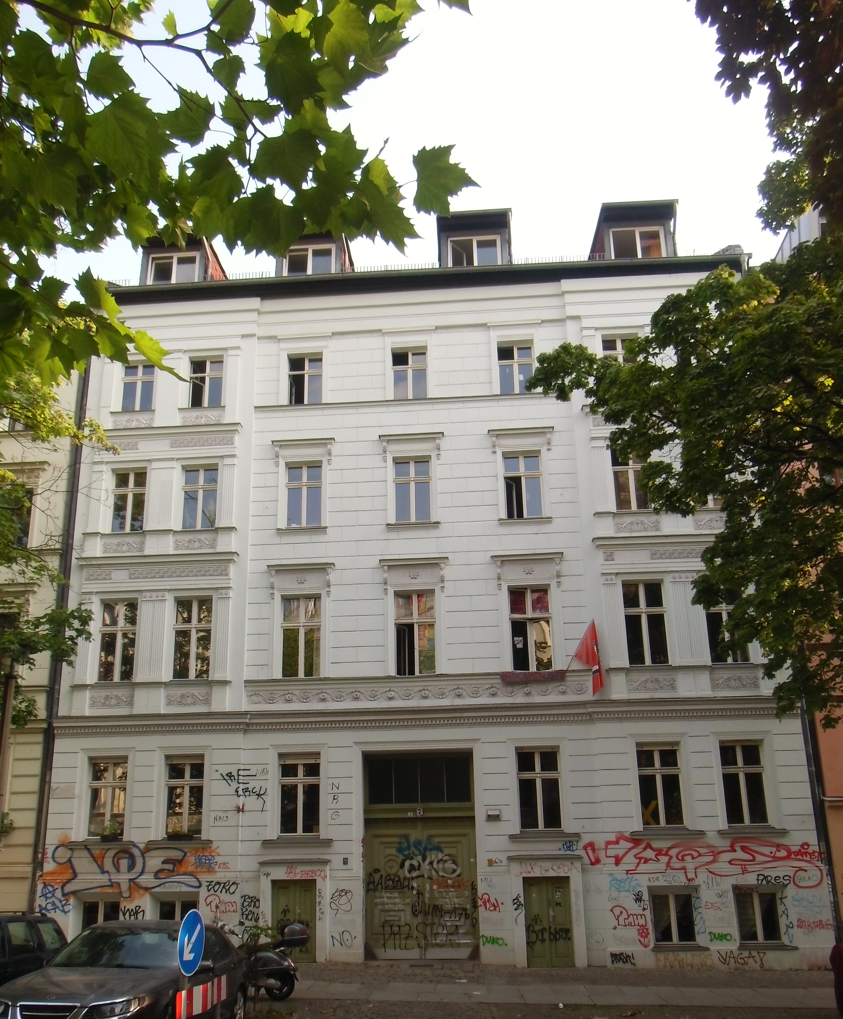 Wohnhaus im denkmalgeschützten Ensemble Fehrbelliner Straße, erbaut 1862